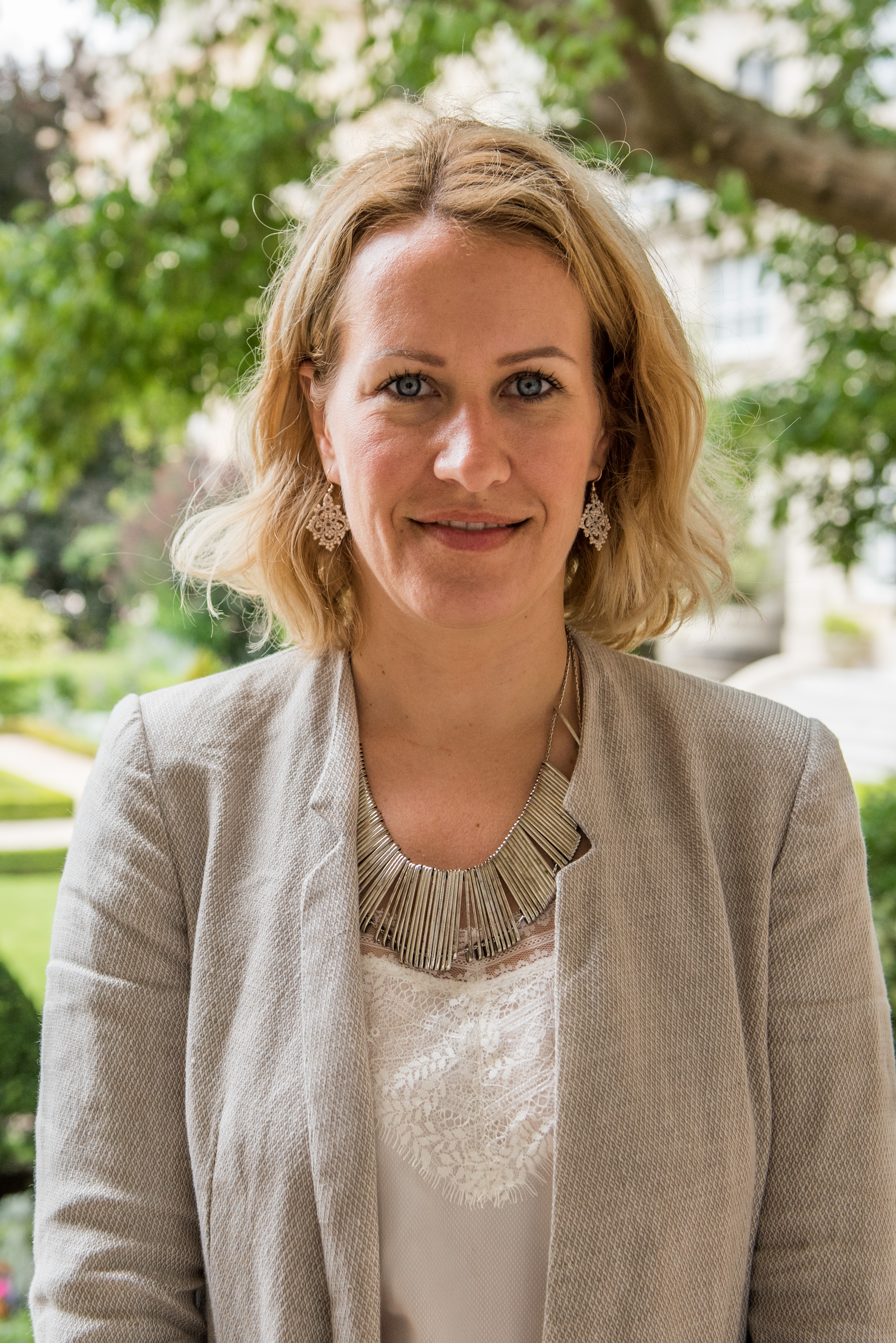 Emilie Chalas dans le jardin des Quatre colonnes du palais Bourbon en 2017.